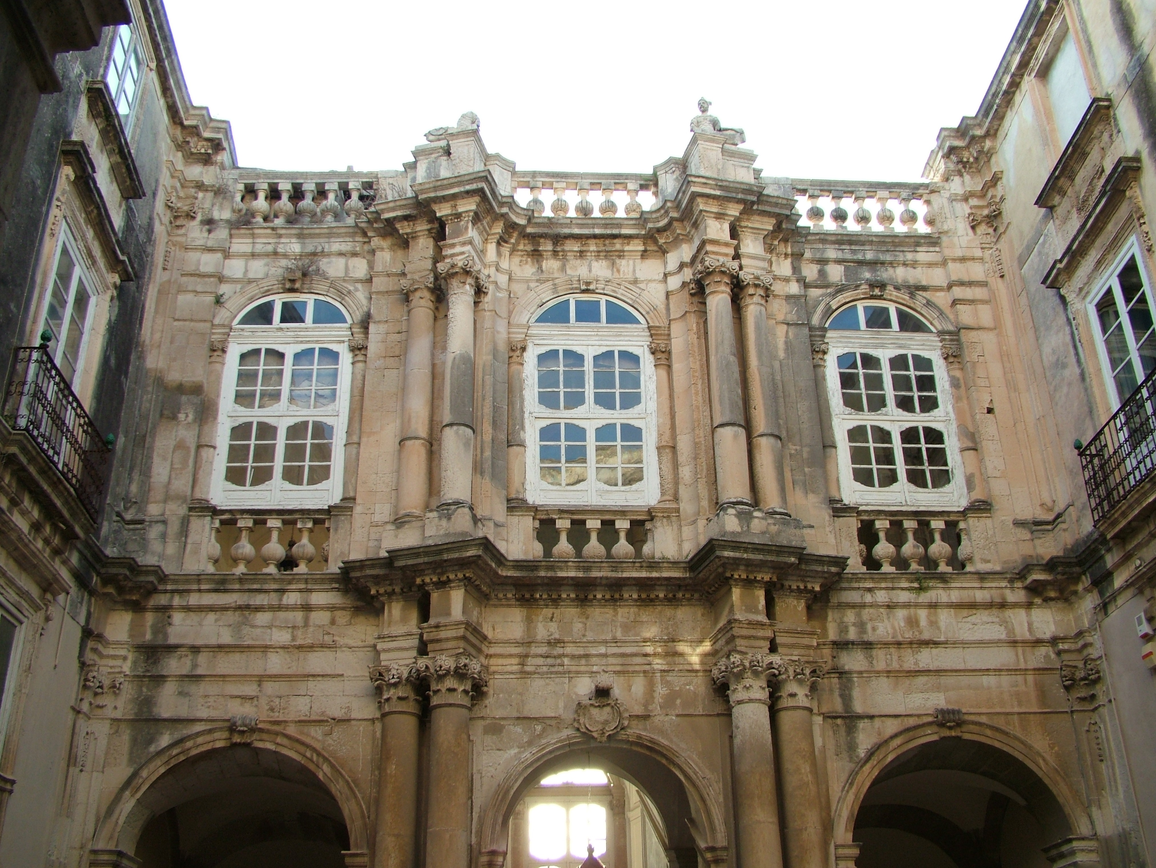 Siracusa, Sizilien, Palazzo Beneventano del Bosco, Innenansicht des Hofes.